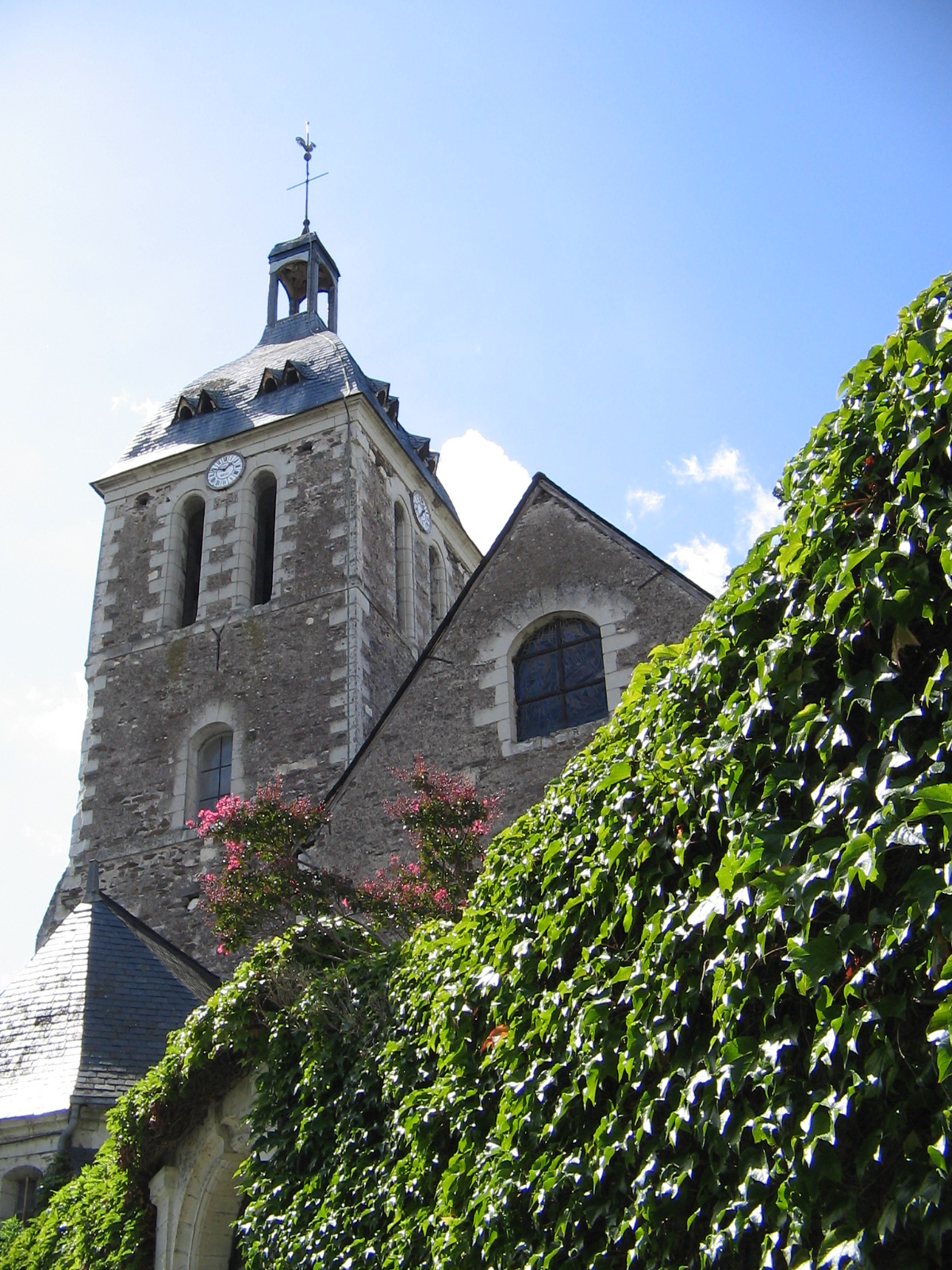 Le clocher de l'église Notre-Dame de Denée (Maine-et-Loire, France) en août 2011.